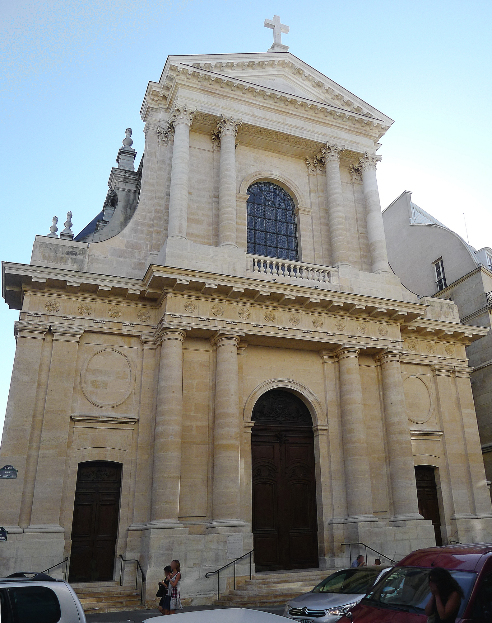 Temple protestant de l'Oratoire du Louvre, rue Saint-Honoré - Paris Ier .